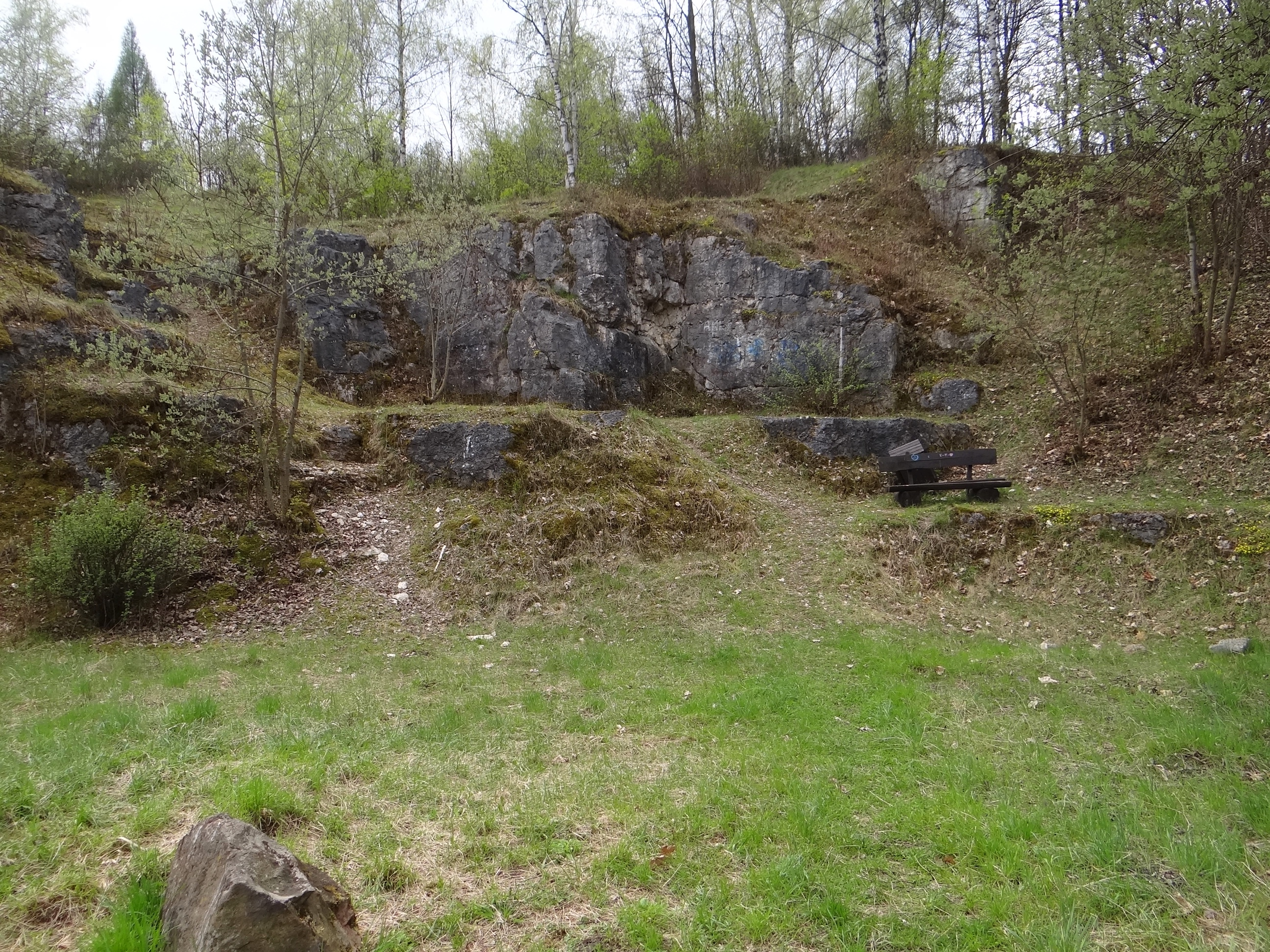 Wzgórze Wielkanoc w Tyńcu w Krakowie